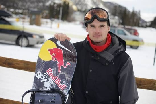 соболев